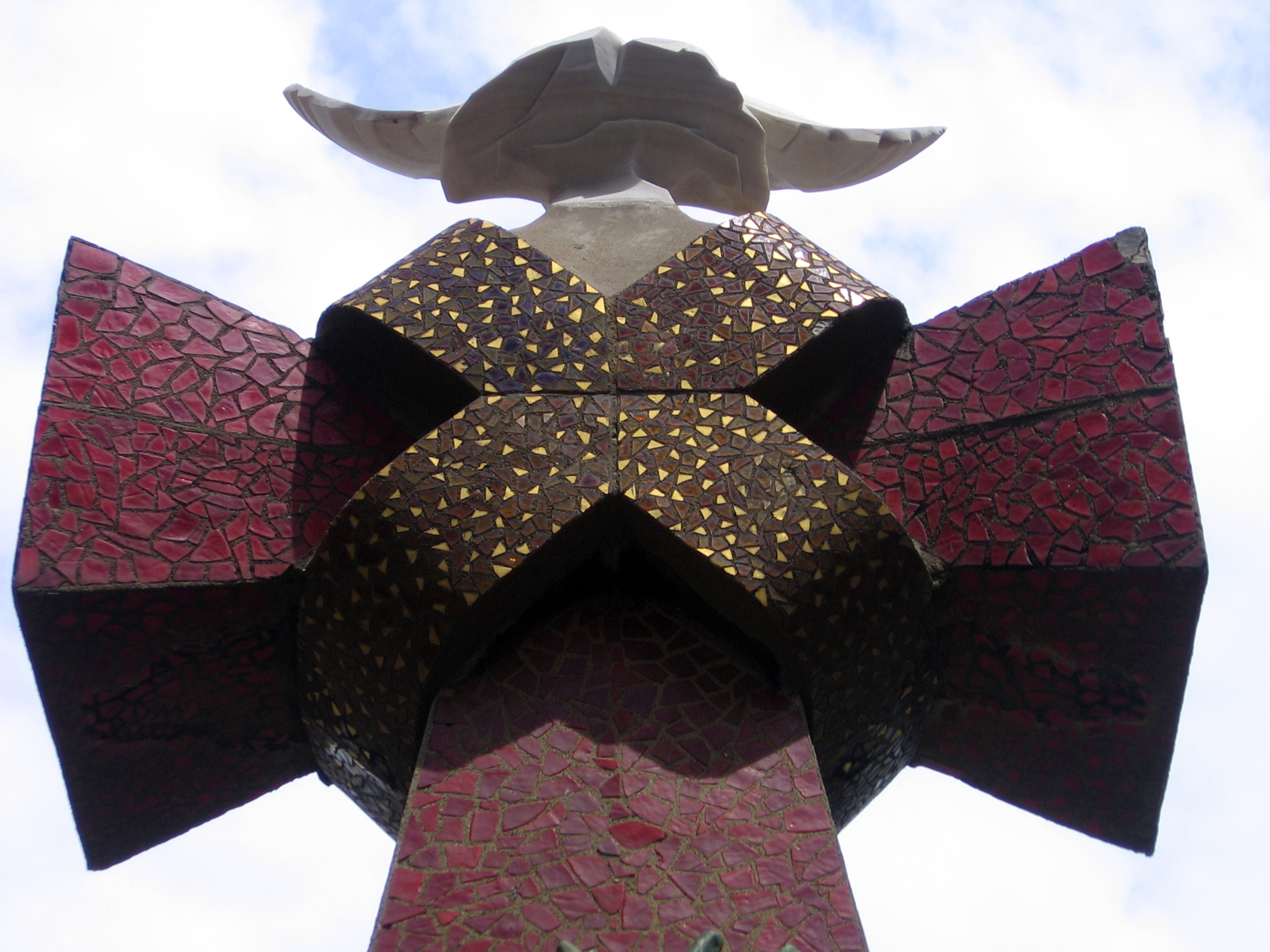 Coronant l'arbre de la vida: la creu, la tau i el colom, al-legoria de la Santíssima Trinitat.